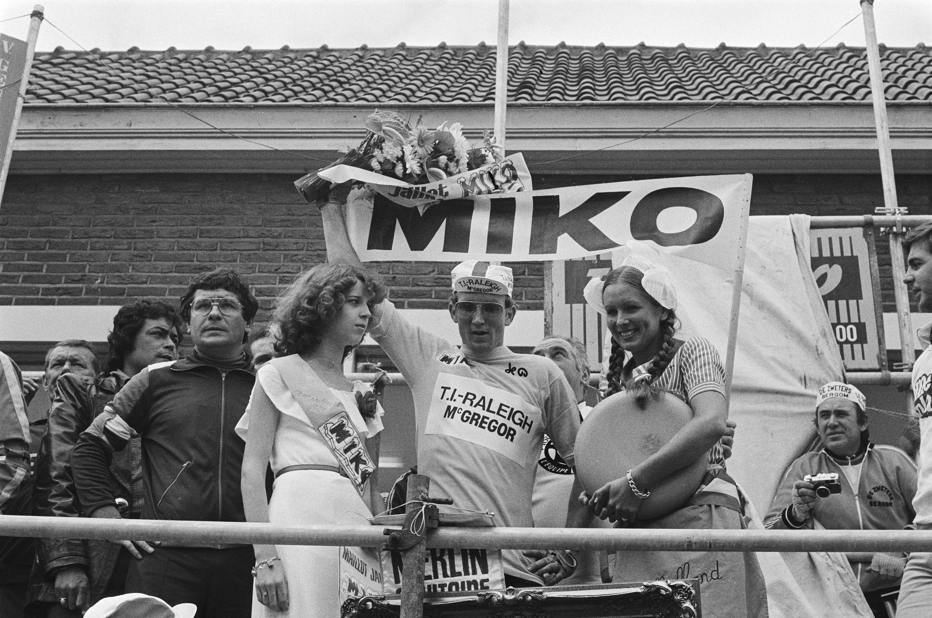 Collectie / Archief : Fotocollectie Anefo Reportage / Serie : [ onbekend ] Beschrijving : Tour de France 1e gedeelte, 1e etappe, Leiden St. Willibrord , Jan Raas op erepodium Datum : 30 juni 1978 Locatie : Leiden, Zuid-Holland Trefwoorden : erepodia, wielrenners Instellingsnaam : Tour de France Fotograaf : Peters, Hans / Anefo Auteursrechthebbende : Nationaal Archief Materiaalsoort : Negatief (zwart/wit) Nummer archiefinventaris : bekijk toegang 2.24.01.05 Bestanddeelnummer : 929-8013